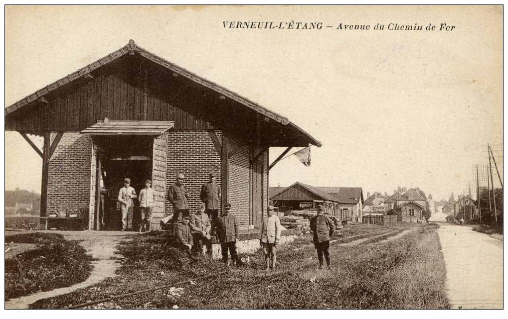 Gare tramway de Verneuil-l'Étang, Seine-et-Marne.